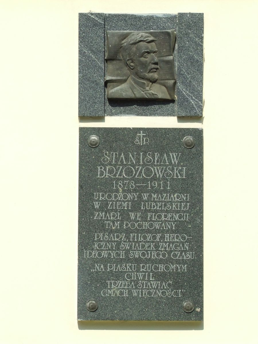 Kościół św. Katarzyny na Służewiu w Warszawie